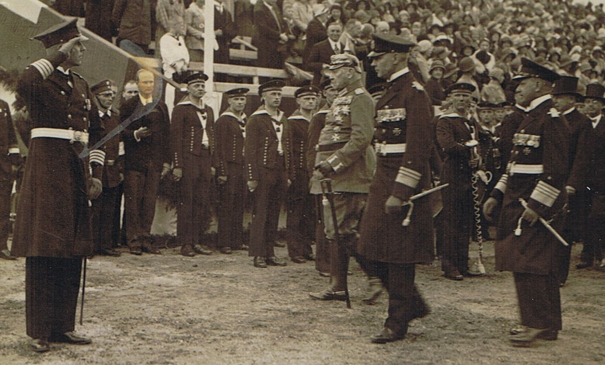 Konteradmiral Heinrich Gebhardt (links) mit Reichspräsident Hindenburg (rechts)